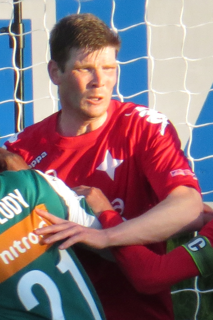 Tuomas Aho, suomalainen jalkapalloilija HIFK:n joukkueessa kaudella 2015.